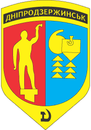 Советский герб Днепродзержинска